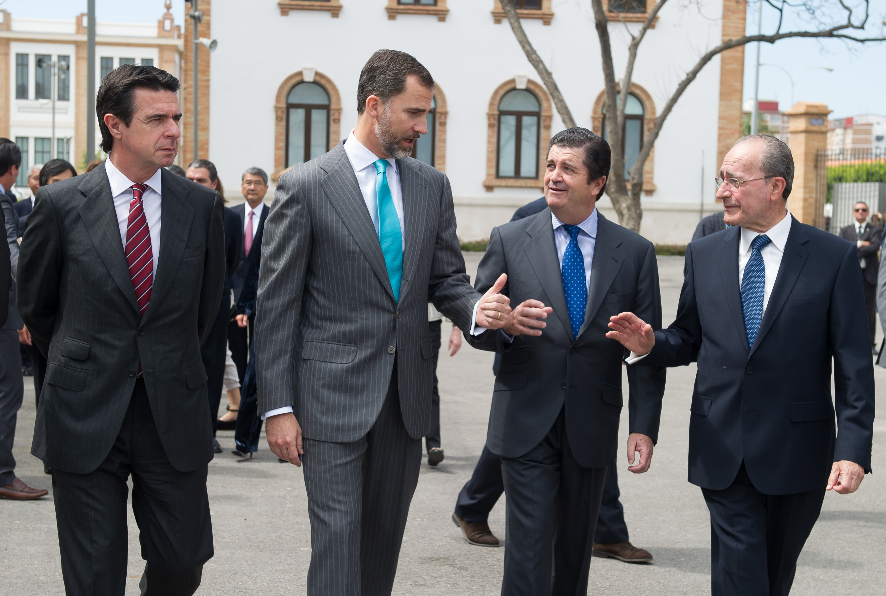 José Manuel Soria, ministro de Industria, Energía y Turismo, S.A.R. el Príncipe Felipe, Borja Prado Eulate, presidente de Endesa, y Francisco de la Torre Prados, alcalde de Málaga.